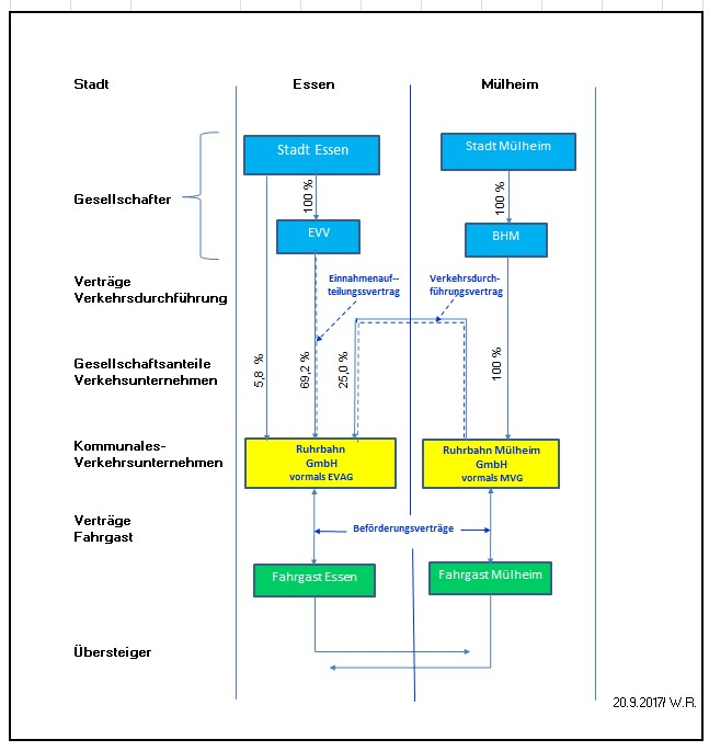 Grafik Ruhrbahngesellschaften